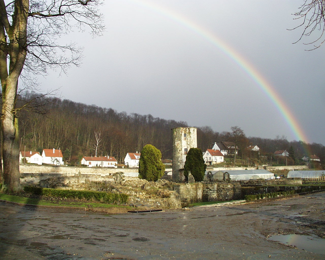 photographie des ruines du château de Jean de Montagu à Marcoussis (Essonne), prise par Belgavox en février fr:2000.